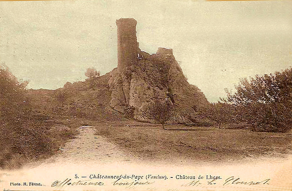 Château de l'Hers à Châteauneuf-du-Pape au début du XXe siècle